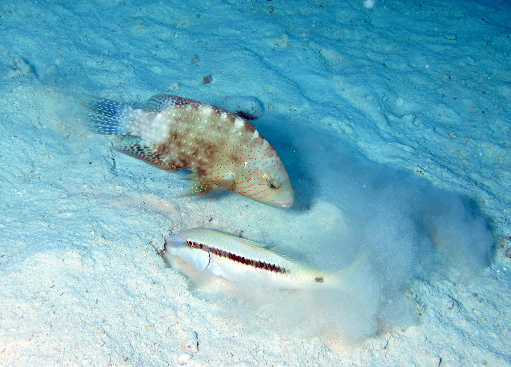 Cheilinus abudjubbe and Parupeneus forsskali feeding on sandy bottom at Fanous East Reef, Red Sea